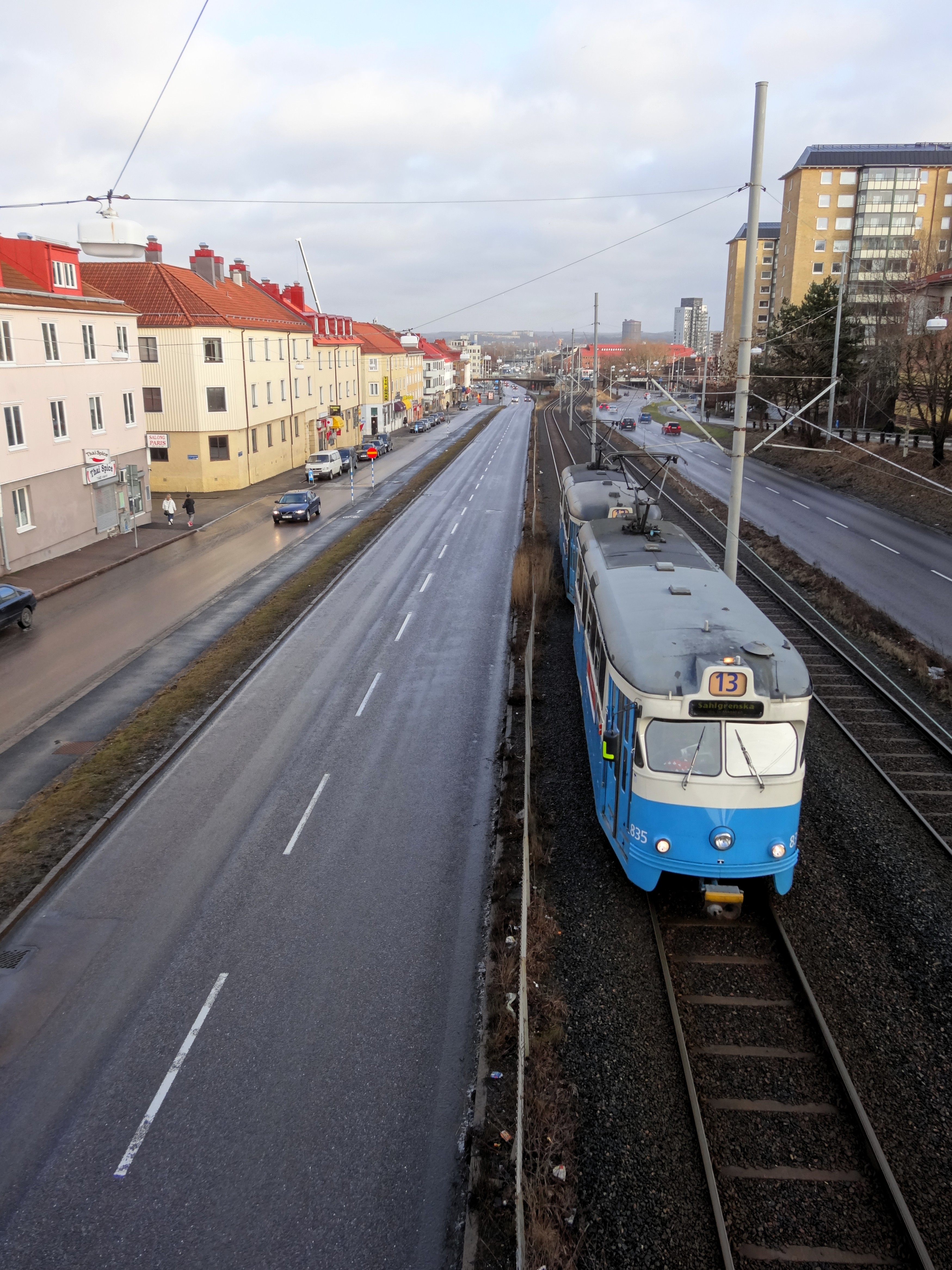 Hjalmar Brantingsgatan i Göteborg. Vy mot öst från gångbron mellan Wieselgrensplatsen och Vågmästareplatsen.